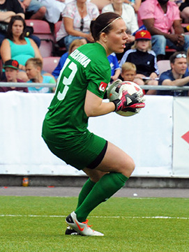 Emelie Almesjö (Eskilstuna United DFF)